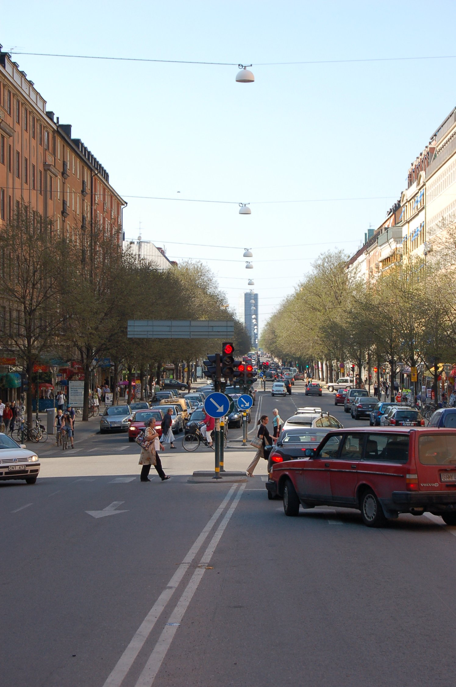 Sveavägen i Stockholm norrut från Apelbergsgatan.